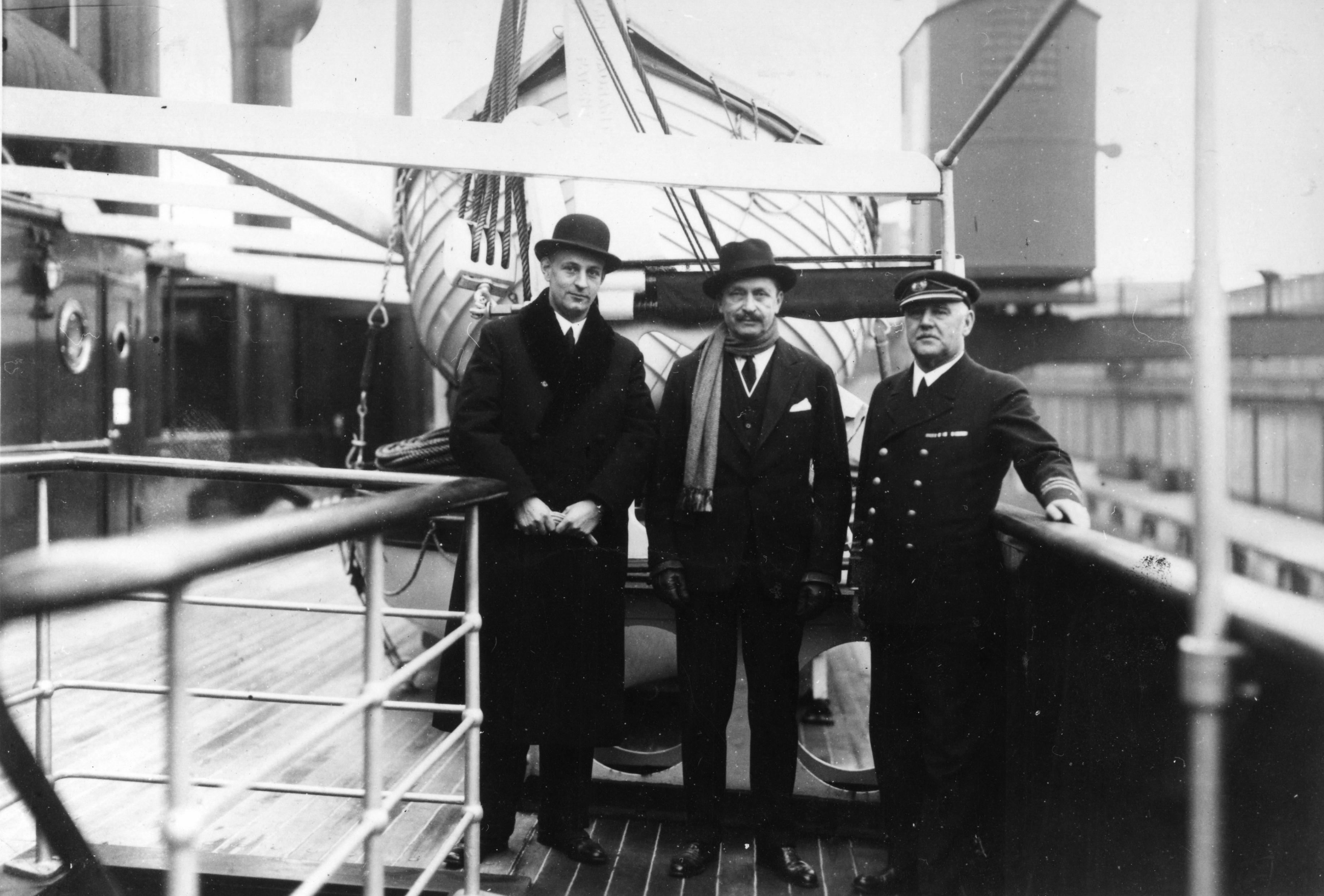 Henrik Ramsay, C. G. Mannerheim and Harry Rönngren onboard S/S Ariadne, 1934